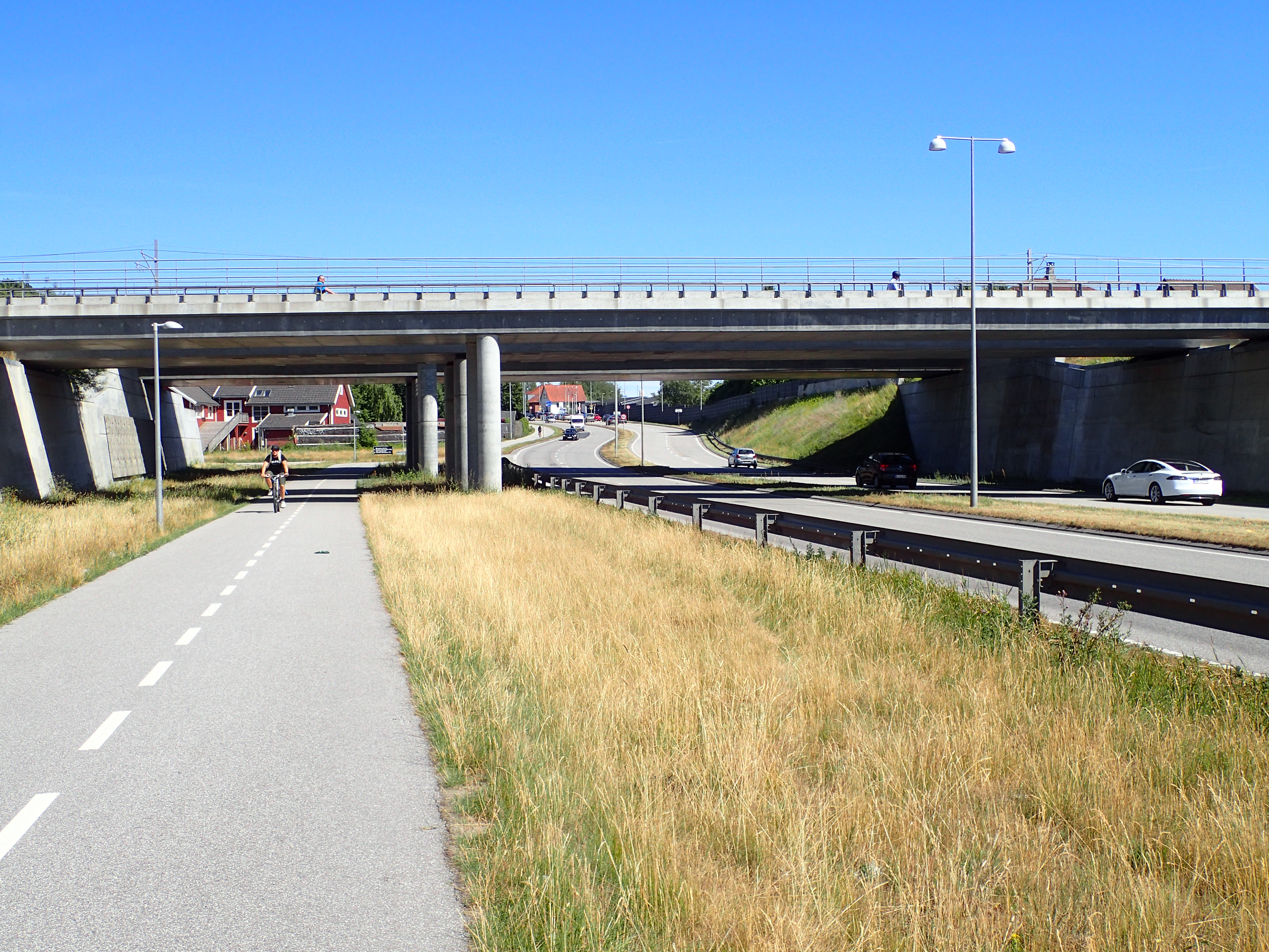 Langenæsbroerne over Åhavevej i Viby.